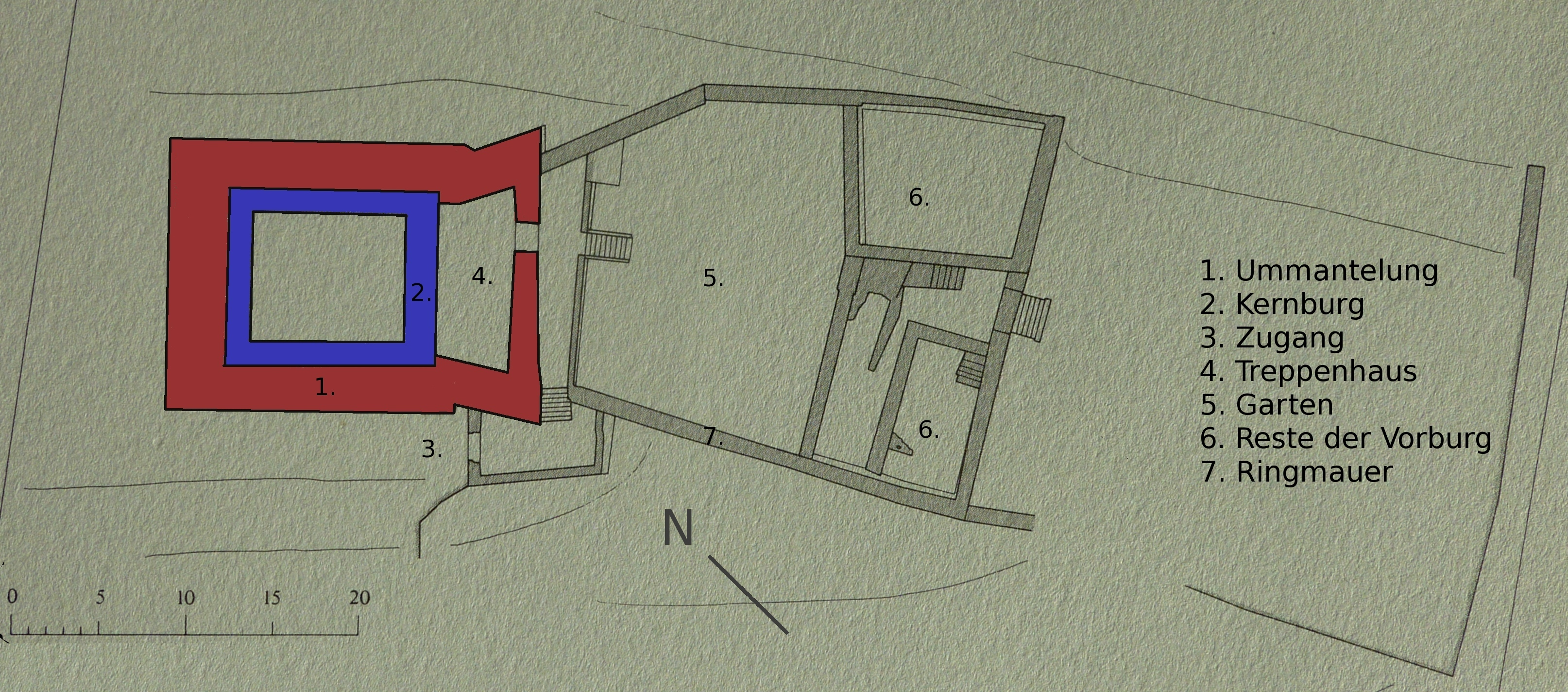 Schloss Mörsburg Plan (Nach einer Vorlage im 'Meyer')